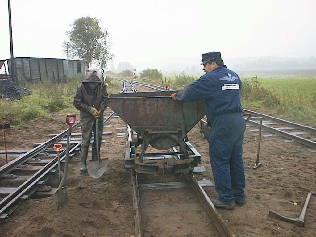 Kuuppavaunu ja radankorjaajia Minkiöllä.